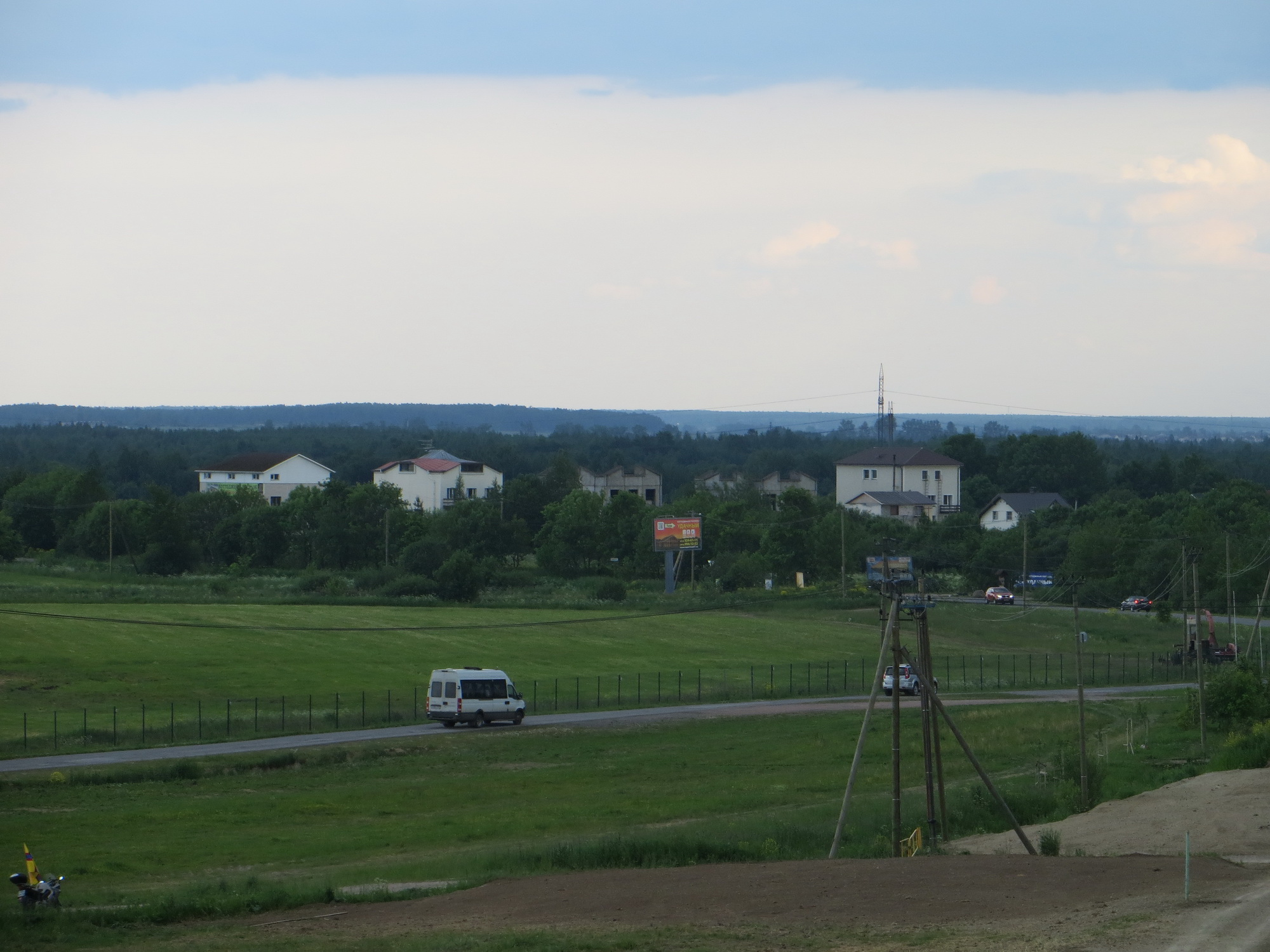 Деревня Мюреля. 2015 г.